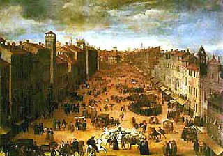 Piazza Navona nel Rinascimento